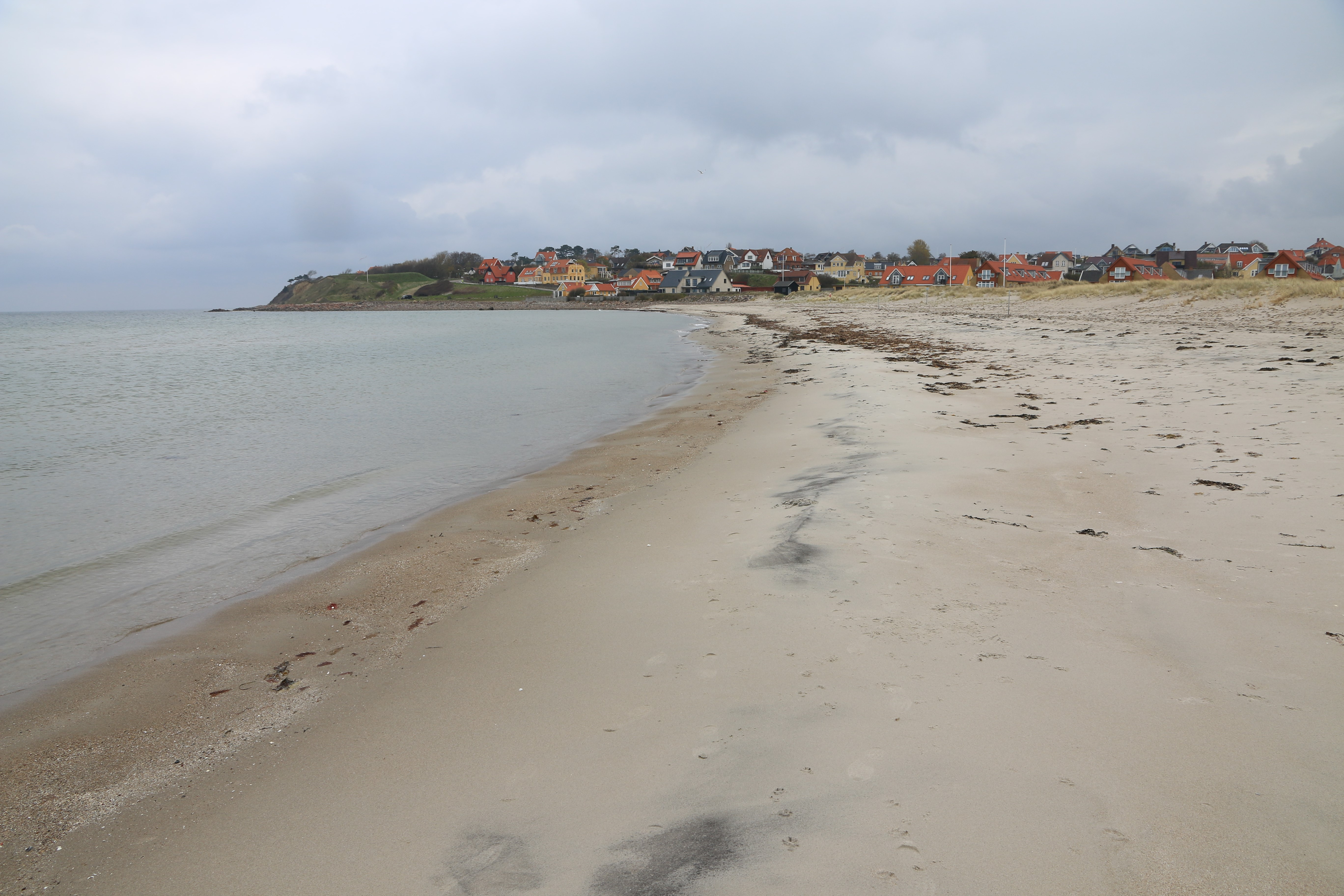 Hundested strand Denmark